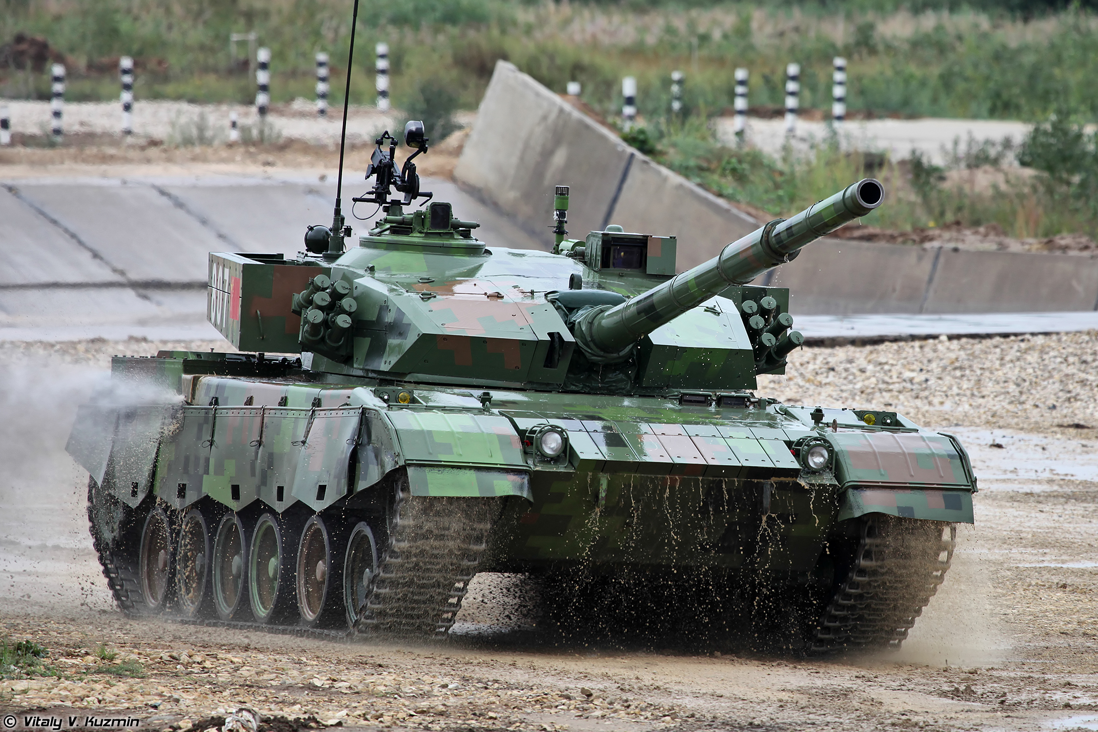 96A (ZTZ-96A) 坦克参加俄罗斯"坦克两项-2014"比赛。